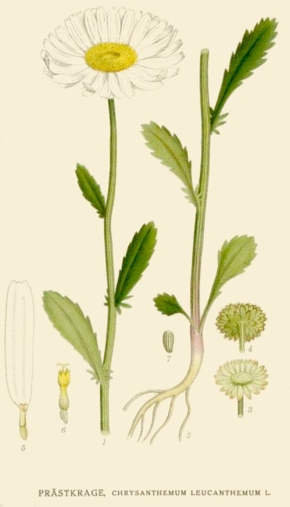 Chrysanthemum leucanthemum 1. upper part of stalk 2. jordstammen och stjälkens bas 3. holken sedd uppifrån med blomfästet 4. holken underifrån 5. kantblomma (3/1) 6. mittblomma 7. fruit (enlarged).